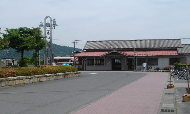 揖斐駅（養老鉄道養老線（撮影当時は近鉄）、岐阜県揖斐川町） 撮影：投稿者(Monami)、撮影日：2005年5月